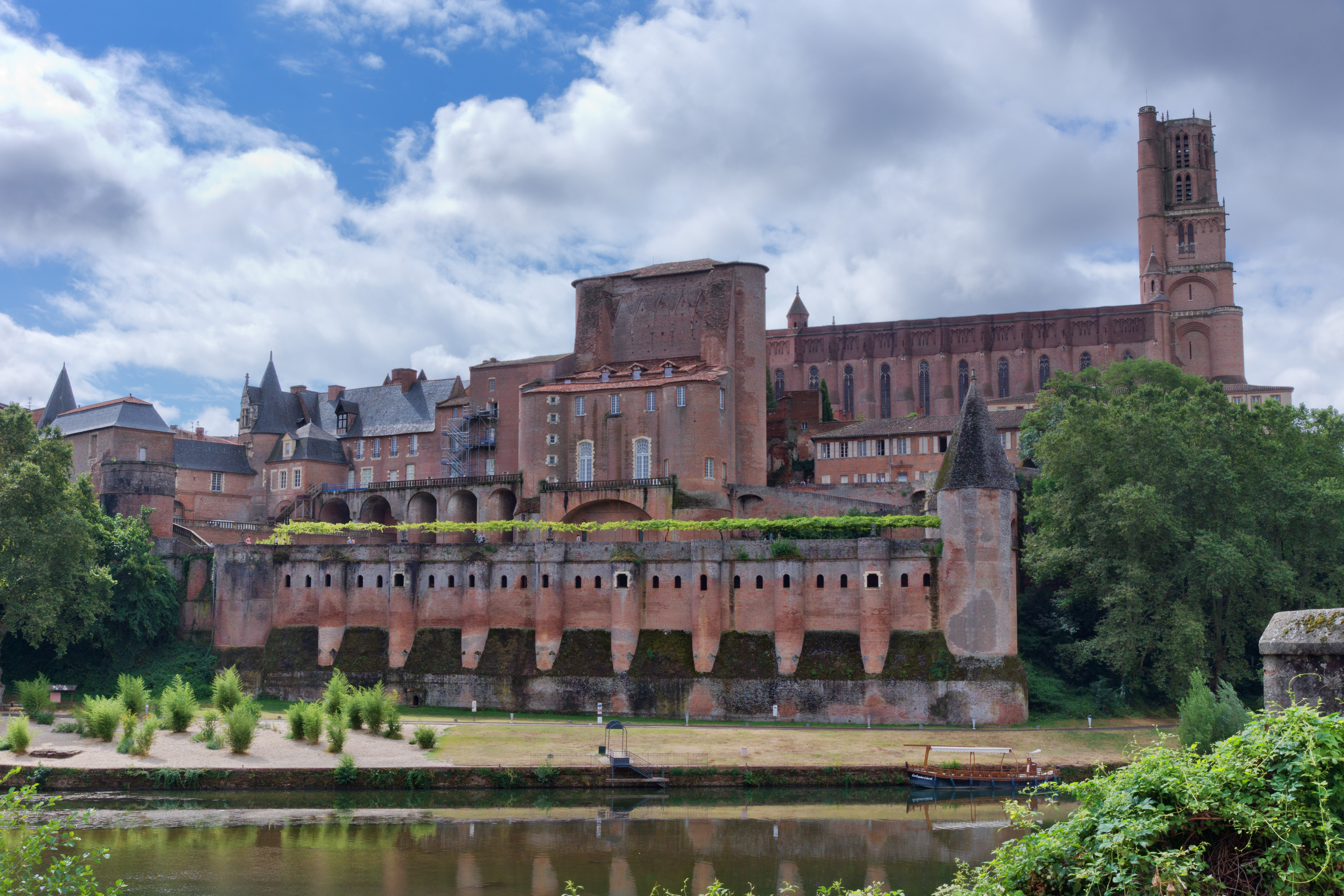 Palais de la Berbie et Cathédrale Ste Cécile vue de l'autre rive du Tarn